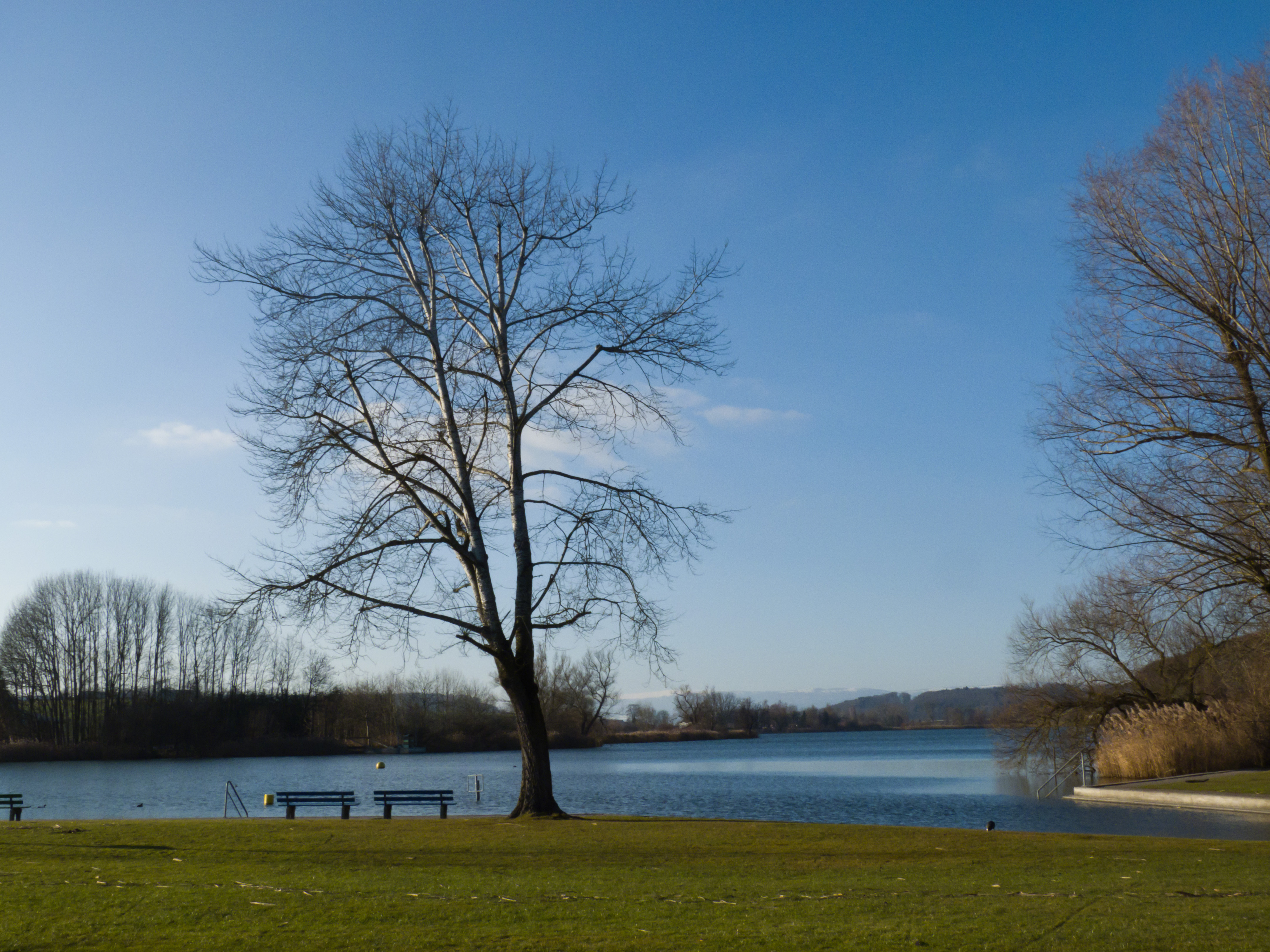 Der Moossee beim Bad